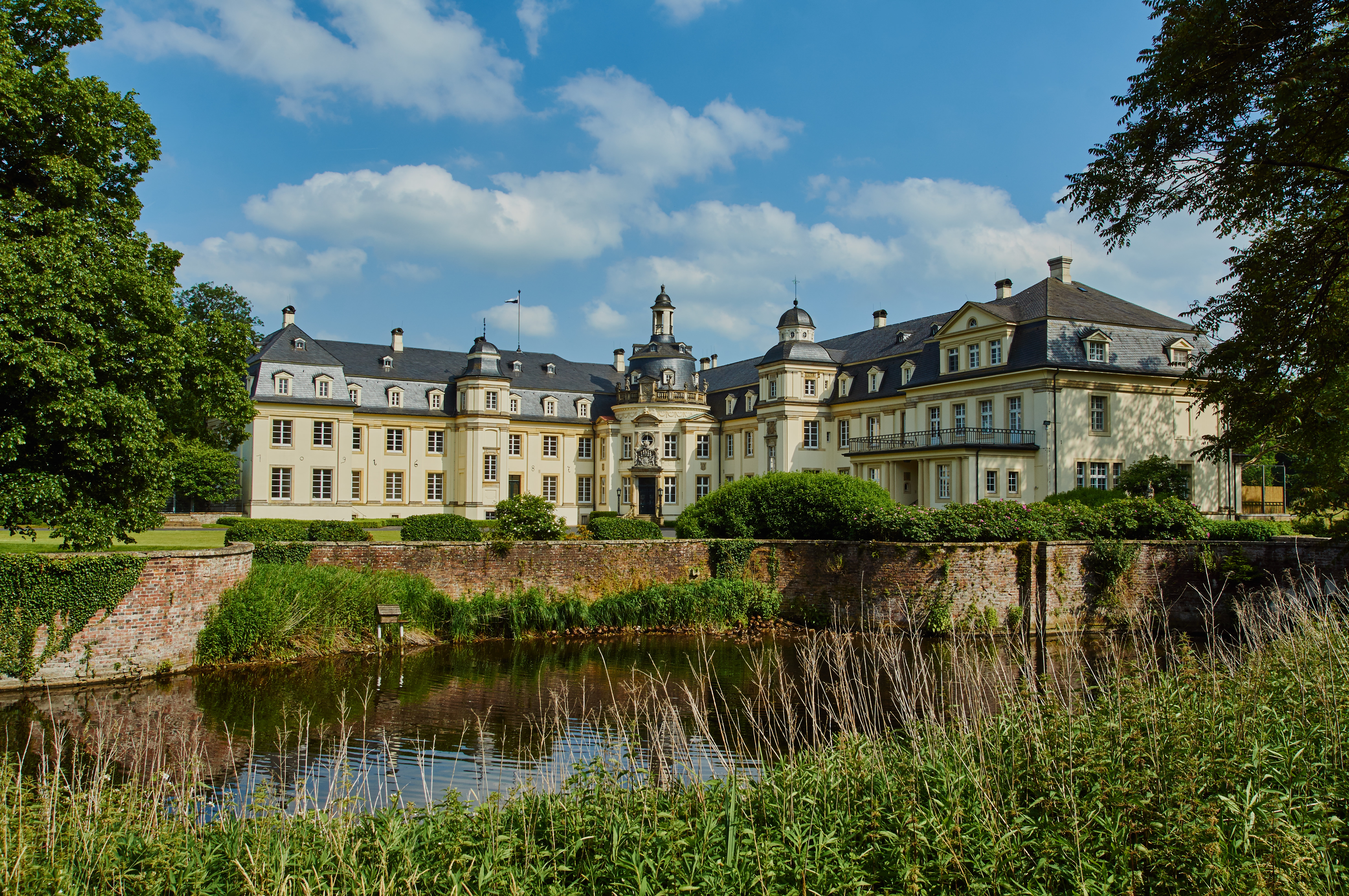 Schloss Varlar, Rosendahl, Nordrhein-Westfalen, Deutschland. This is a photograph of an architectural monument. It is on the list of cultural monuments of Rosendahl